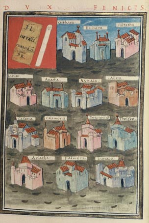 Dux Fenicis from Notitia dignitatum